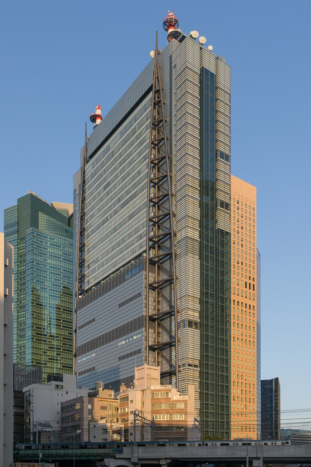 汐留NTVタワー、東京都港区。